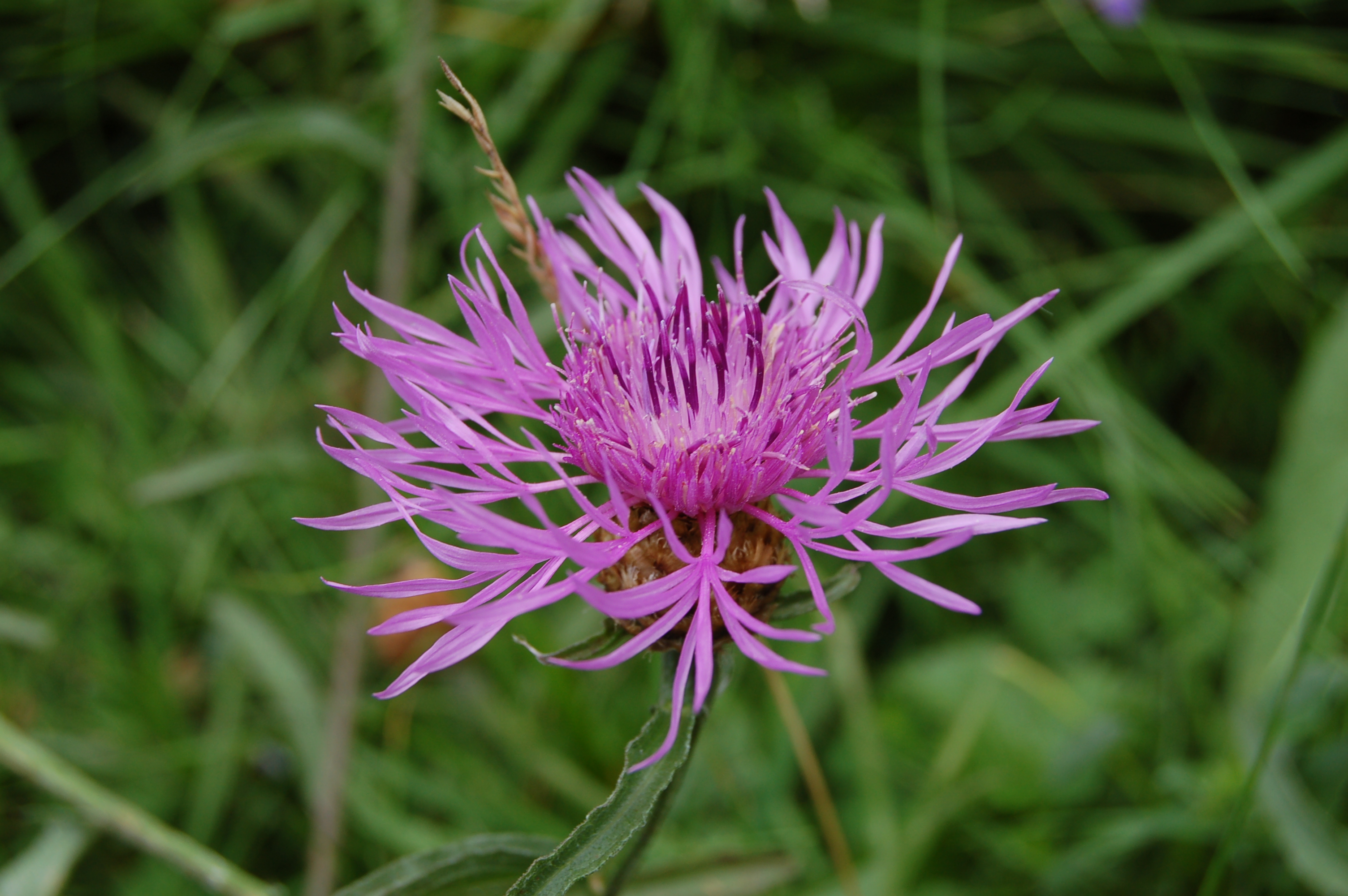 Centaurée aspera, spécimen photographié dans la chaîne des puys Auvergne